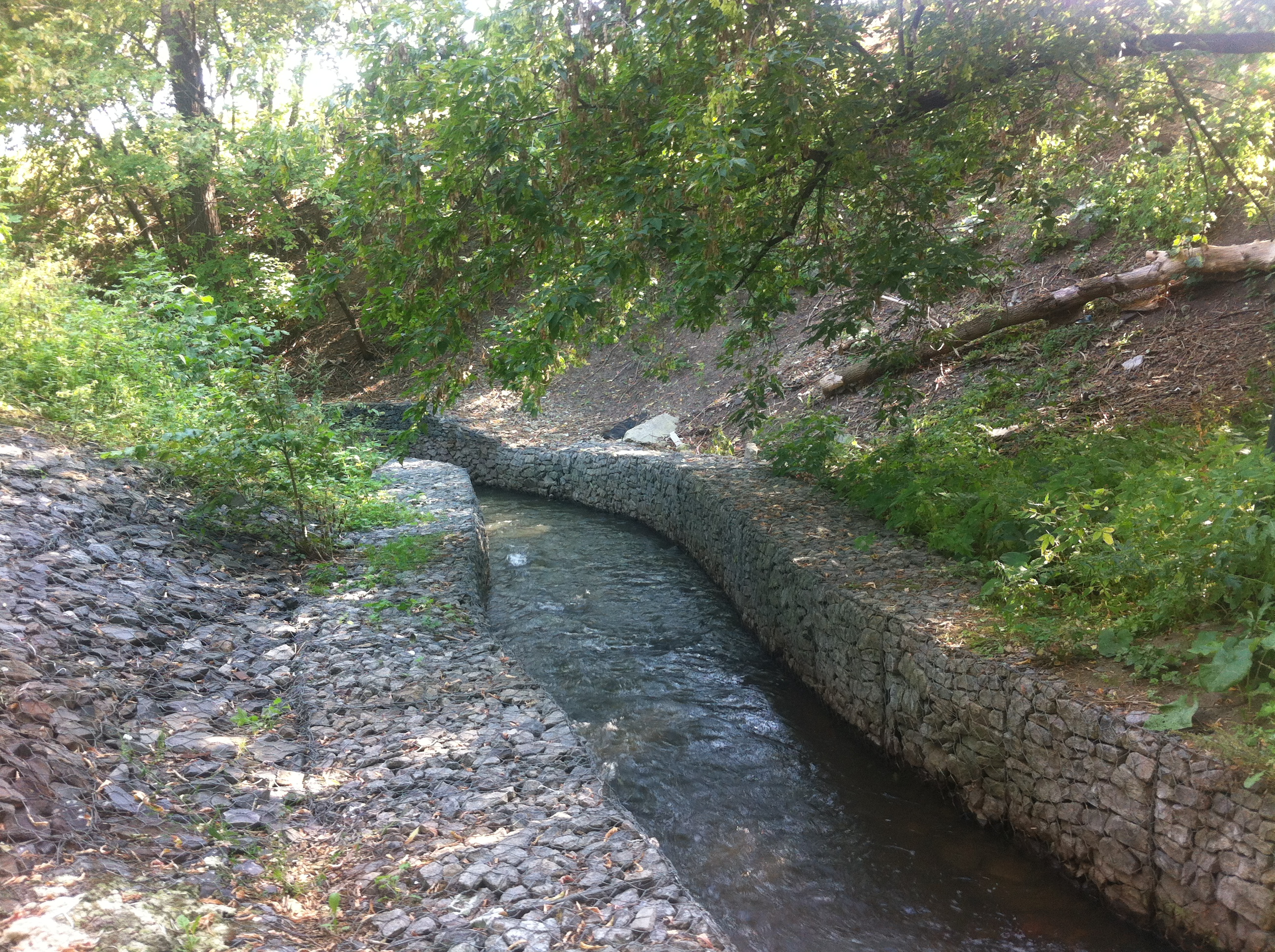 Река Чура возле Даниловского кладбища.